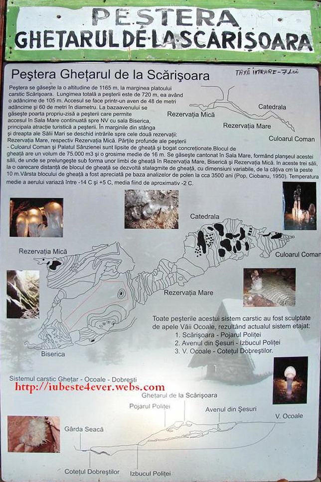 Peştera Scărişoara (panou informativ)